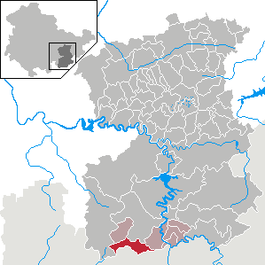 Schlegel in Thuringia - Saale-Orla-Kreis